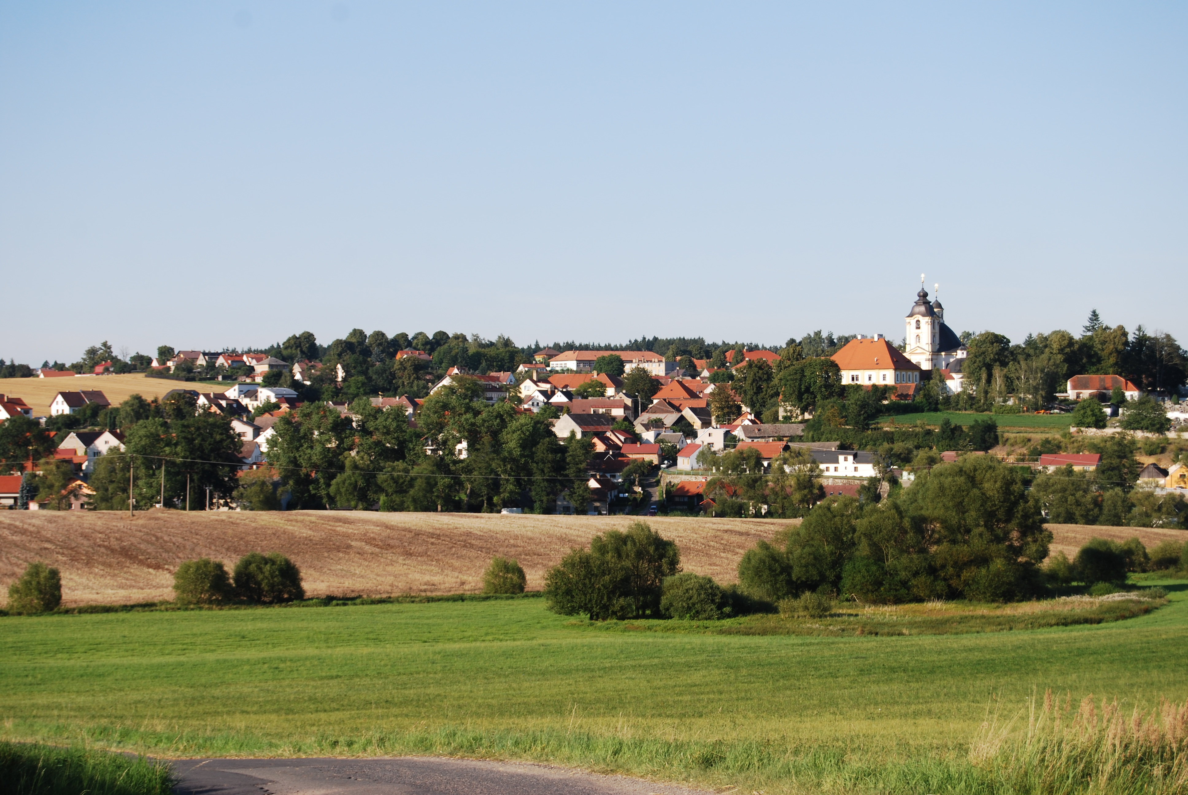 Pohled na městys ze silnice na Zálší. Sepekov. Okres Písek. Česká republika.